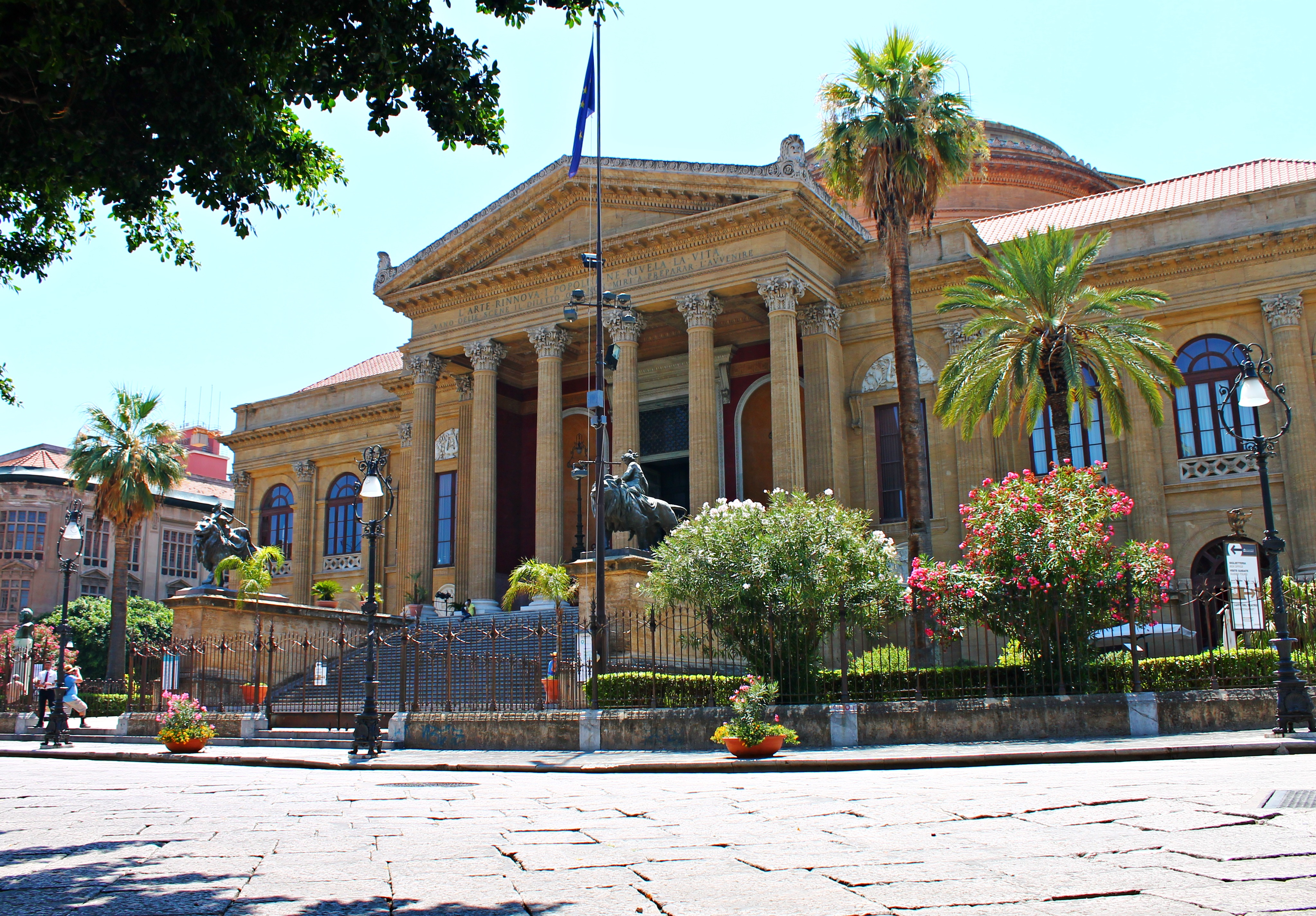 Teatro Massimo Vittorio Emanuele, esterno visto da Piazza Verdi This is a photo of a monument which is part of cultural heritage of Italy.